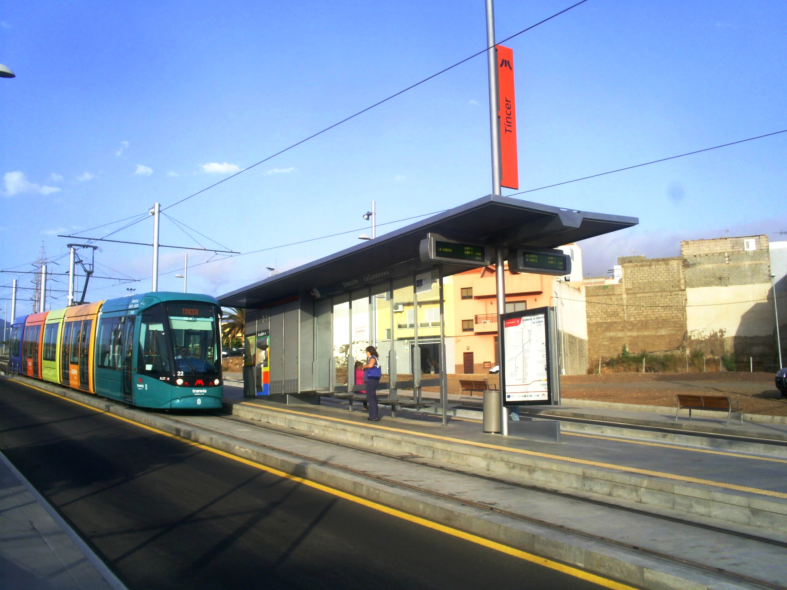 Imagen de la parada "Tincer" del Tranvía de Tenerife.